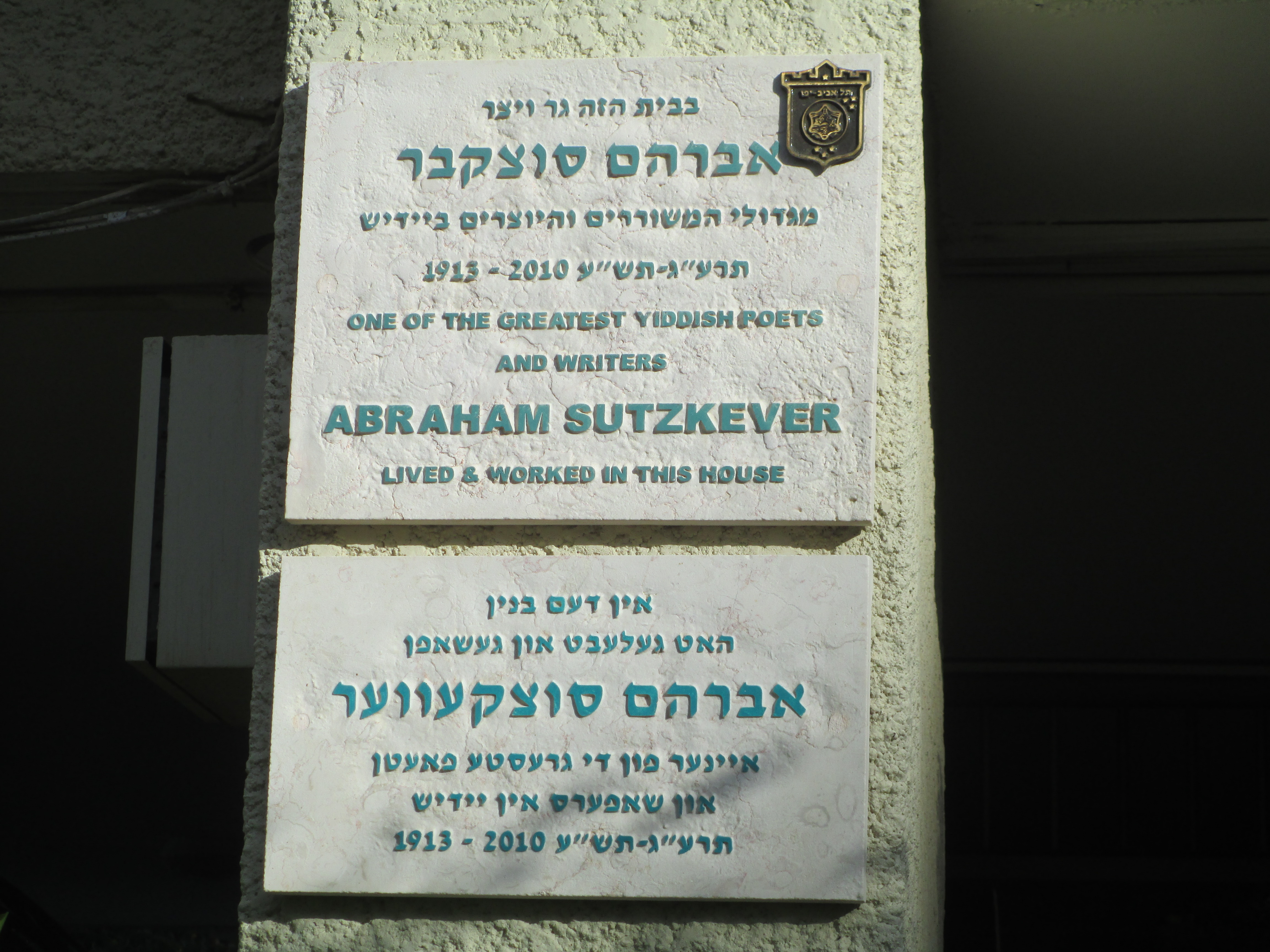 לוחיות זיכרון בעברית וביידיש לאברהם סוצקבר על ביתו ברח' שרת 20 בתל אביב